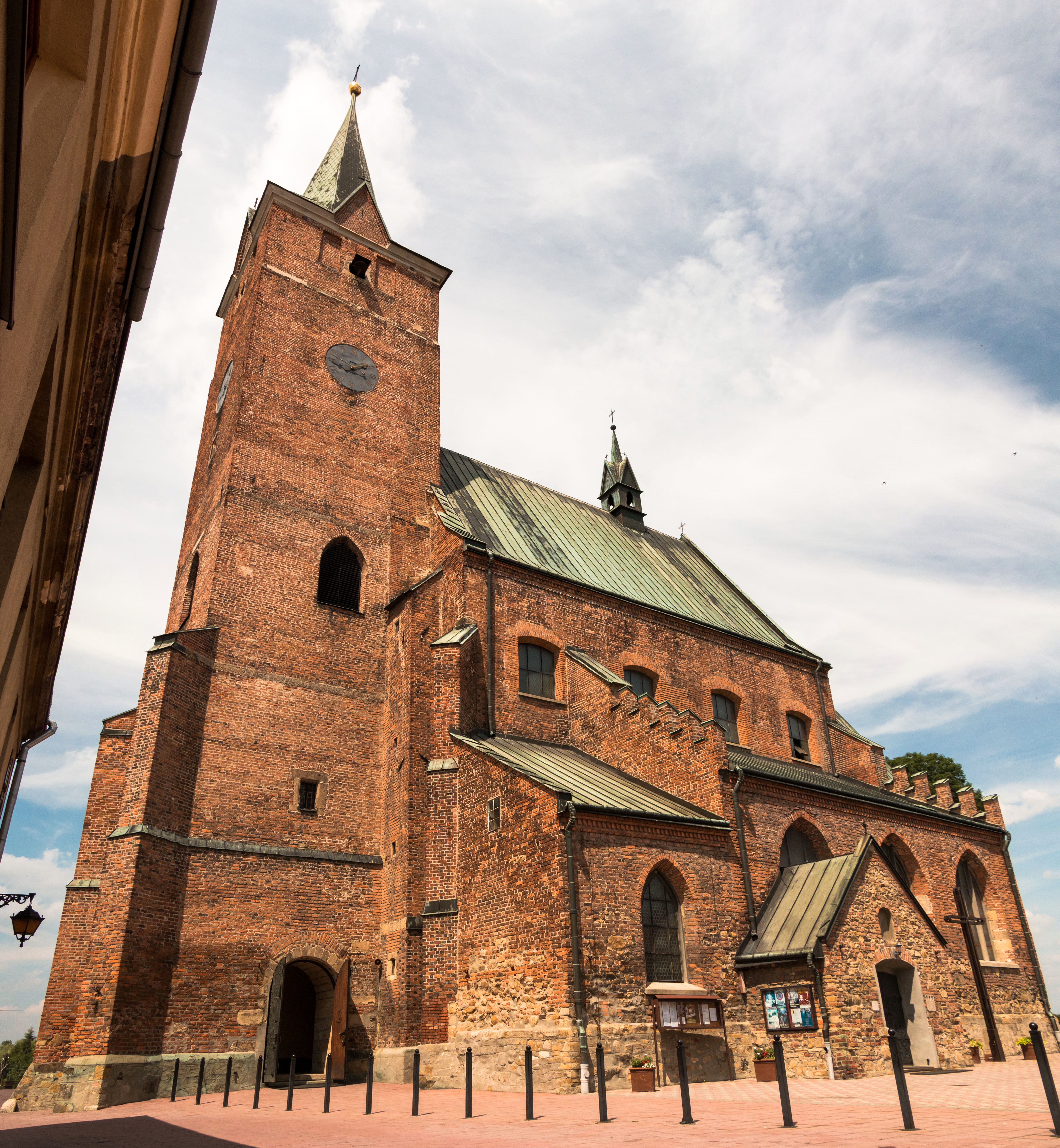 Pilzno, kościół par. p.w. św. Jana Chrzciciela, XIV, XIX